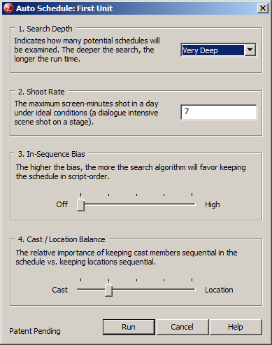 Окно авто-планирования в Софокл 2007